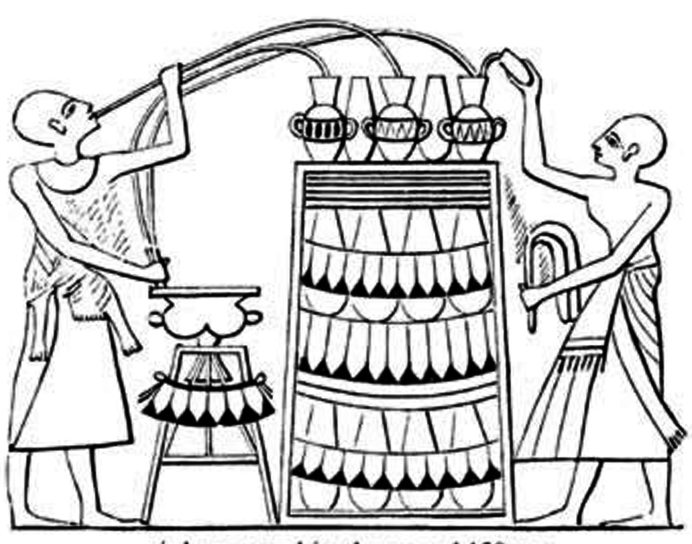 Siphonage du vin en Égypte antique 2450 BP